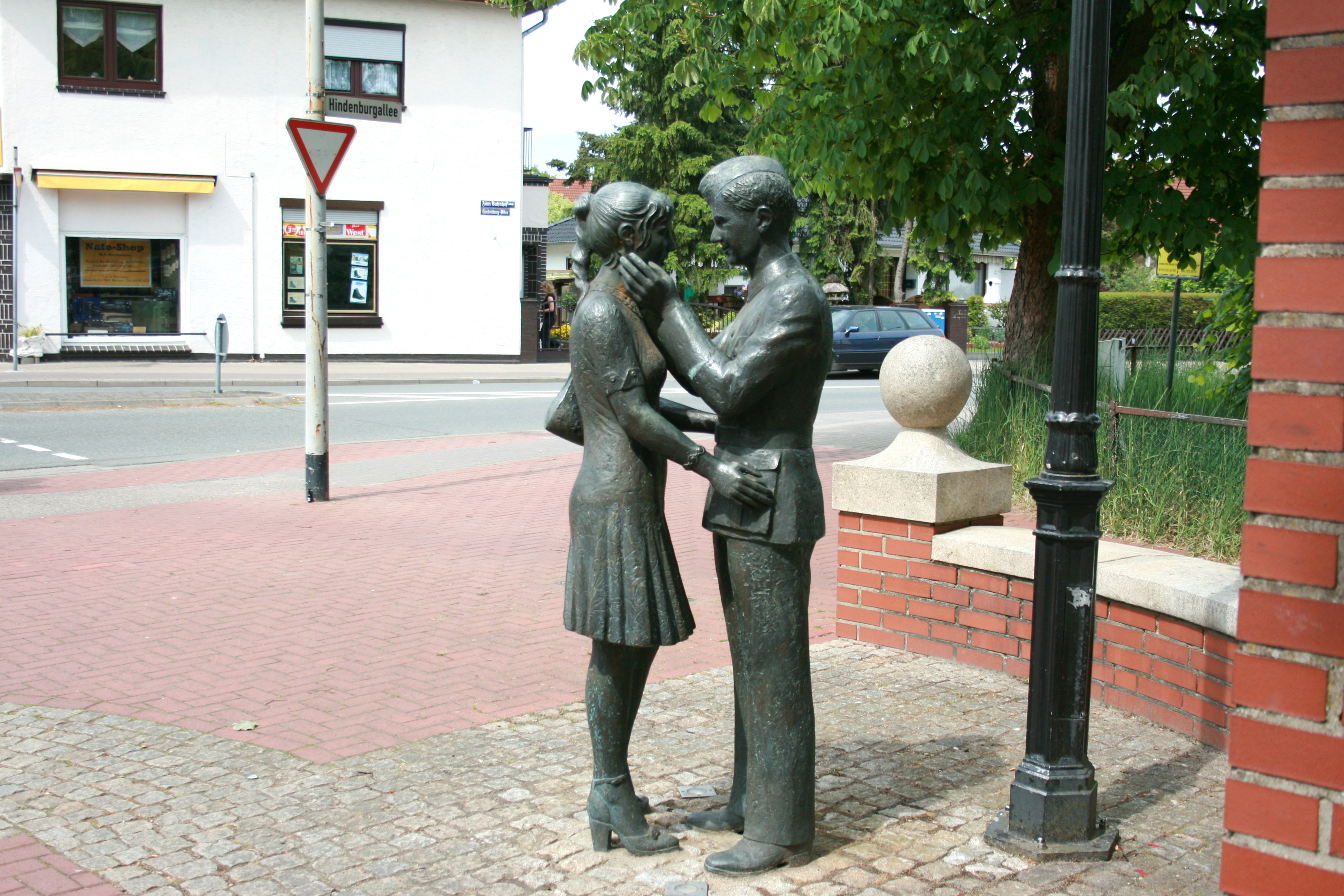 Lili-Marleen-Gruppe von Claus Homfeld auf der Wilhelm-Bockelmann-Straße in Munster (Örtze)